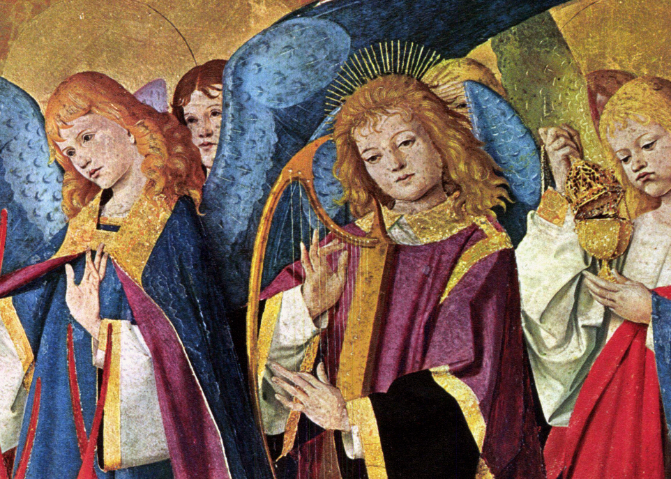 Detalhe da Coroação da Virgem